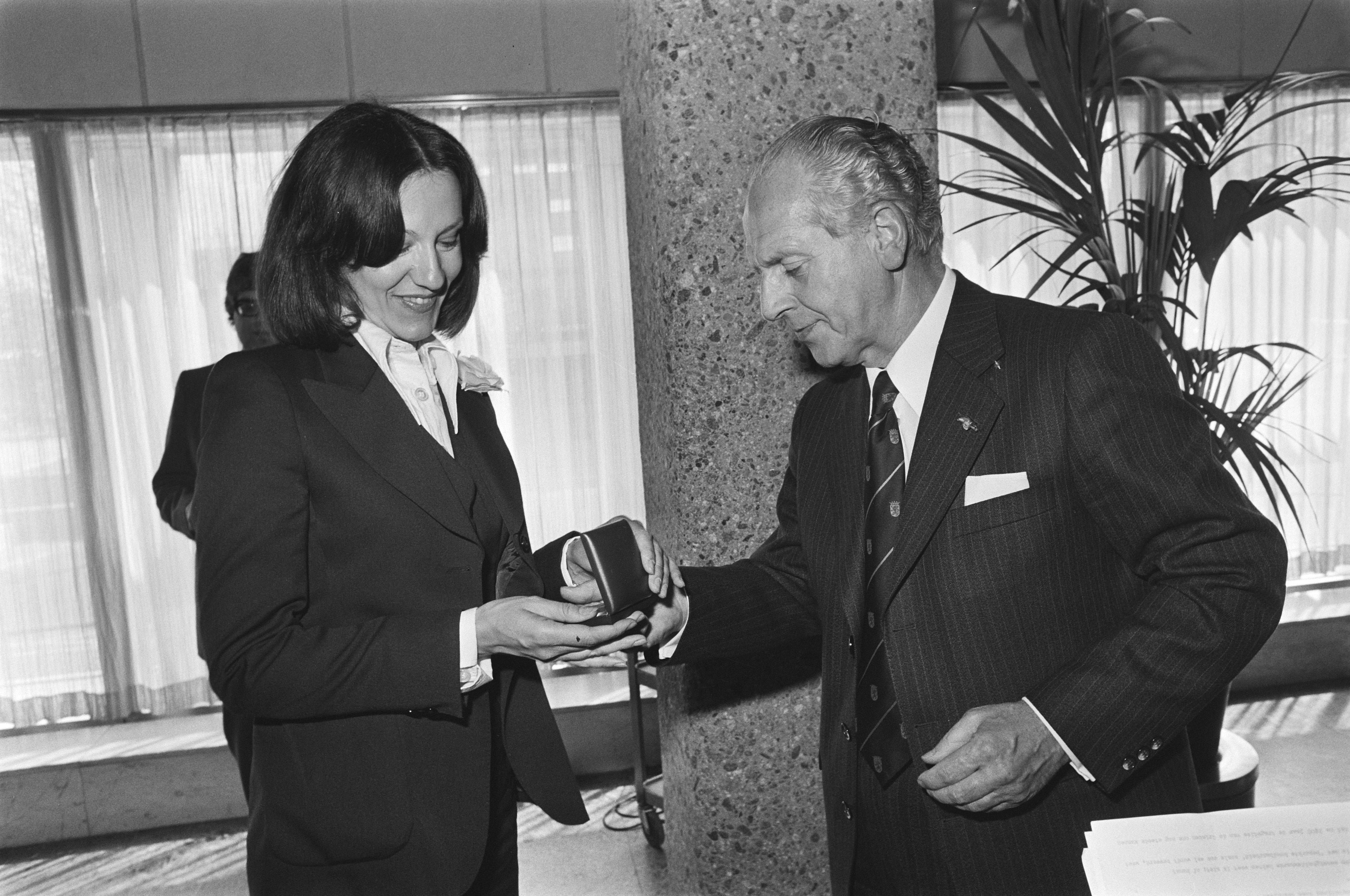 Collectie / Archief : Fotocollectie Anefo Reportage / Serie : [ onbekend ] Beschrijving : 10/11, Commissaris van de Koningin in Zuid Holland, M. Vrolijk reikt Theo d'Or uit aan Anne Wil Blankers 12/13, de Columbina voor Ellen Vogel Datum : 13 mei 1976 Locatie : Zuid-Holland Trefwoorden : toneelprijzen, uitreikingen Persoonsnaam : Anne Wil Blankers, Vogel, Ellen, Vrolijk, M. Fotograaf : Mieremet, Rob / Anefo Auteursrechthebbende : Nationaal Archief Materiaalsoort : Negatief (zwart/wit) Nummer archiefinventaris : bekijk toegang 2.24.01.05 Bestanddeelnummer : 928-5755